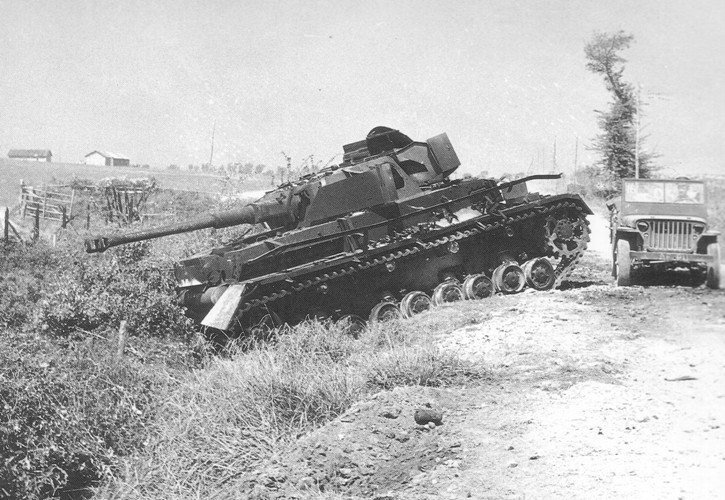 Panzer IV messo fuori combattimento a Salerno